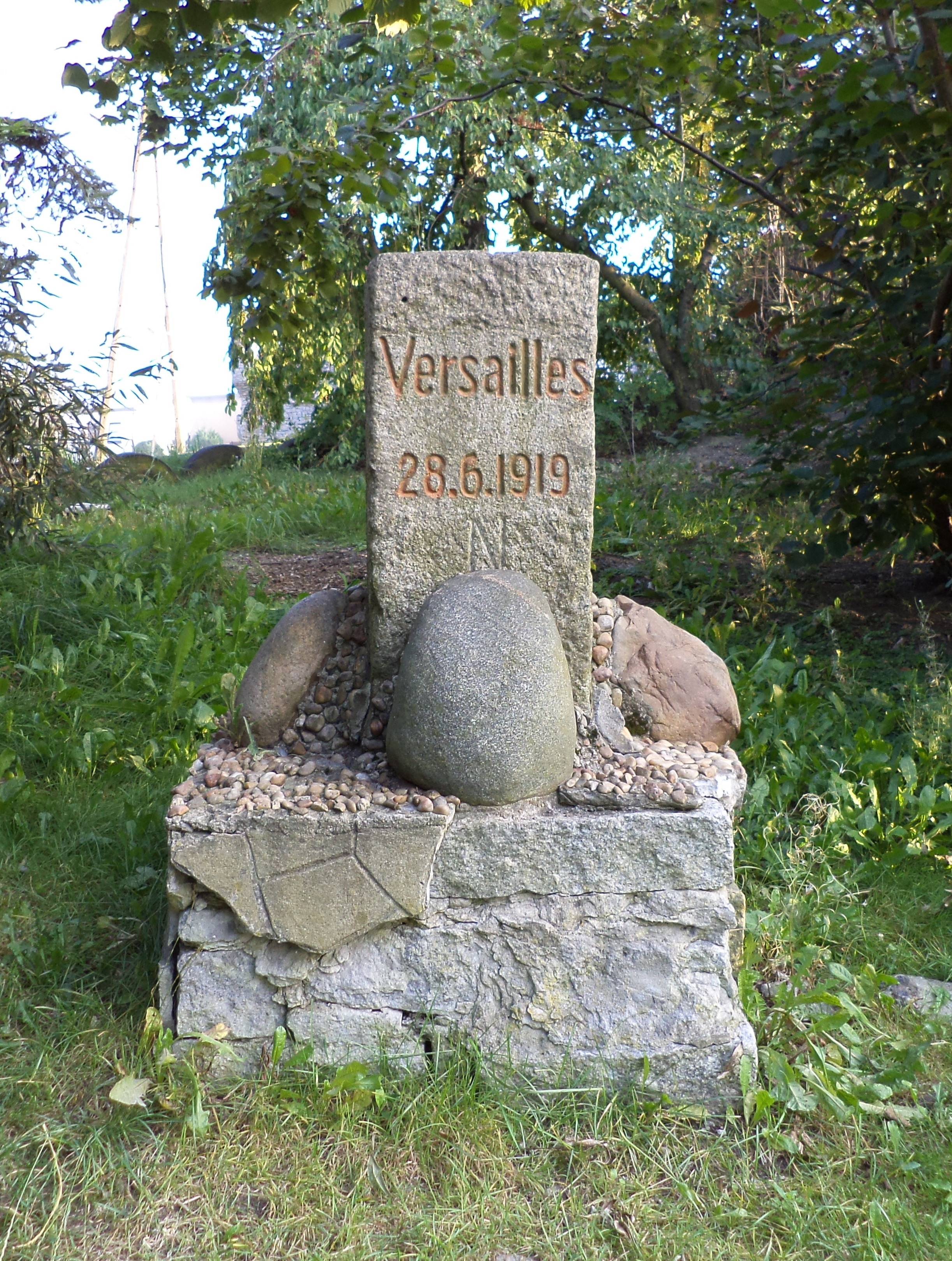 Dawny kamień graniczny z granicy między Polską a Niemcami. Obecnie pomnik przy ul. Jana Waliski w Tarnowskich Górach - Reptach Śląskich